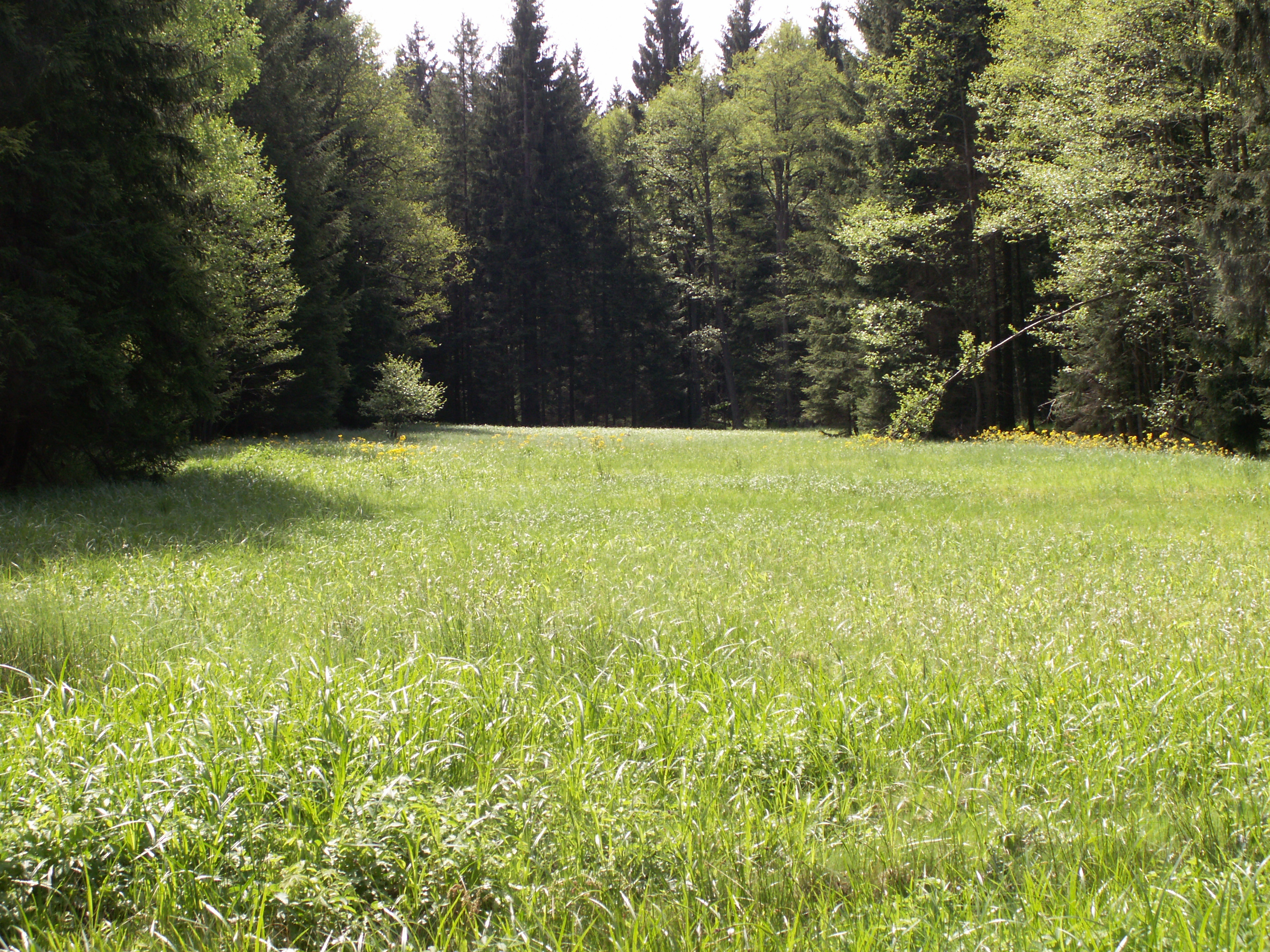 Přírodní památka Mlýnský potok a Uhlířky, část Mlýnský potok, okres Žďár nad Sázavou, kraj Vysočina